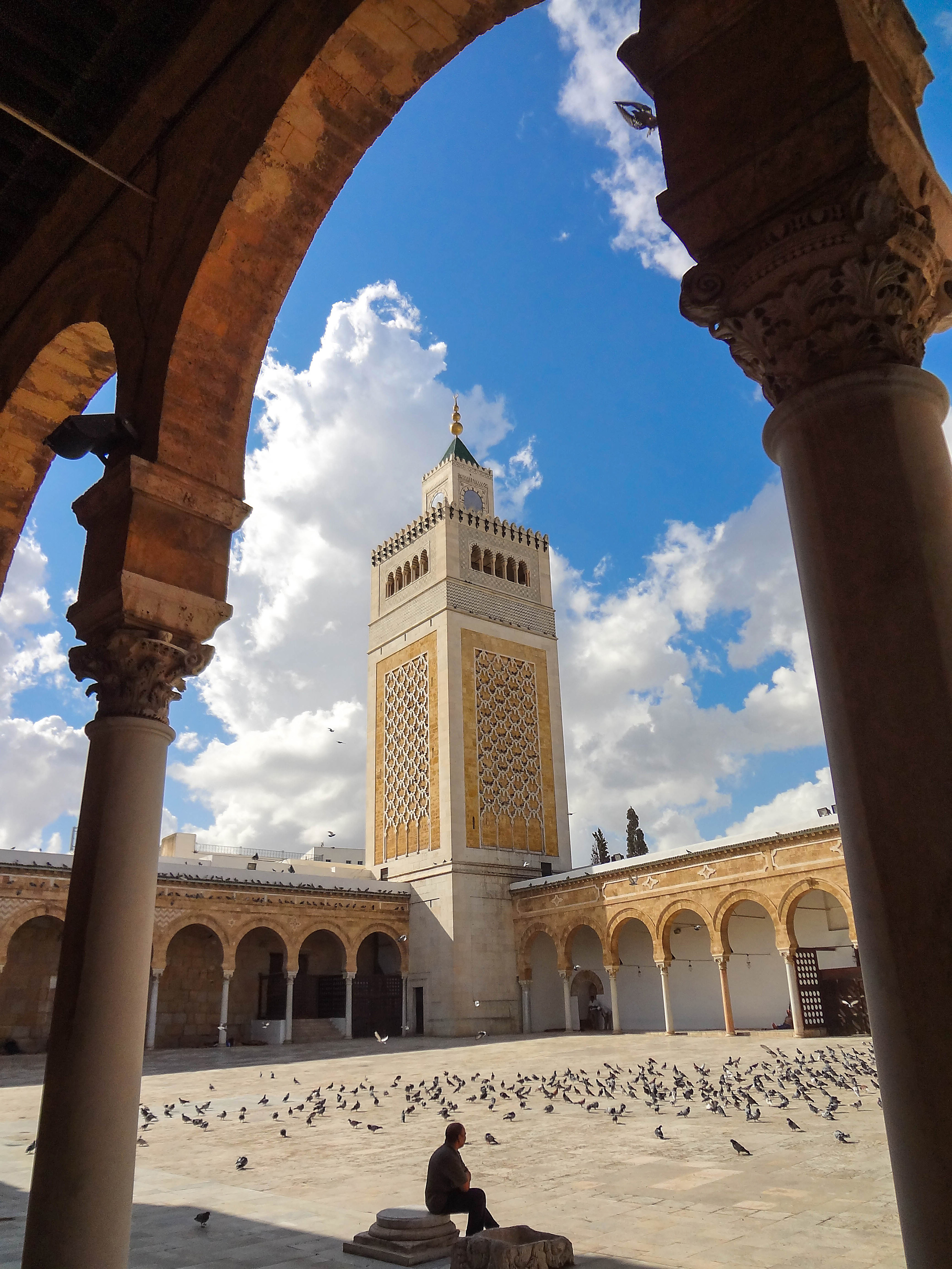 Grande Mosquée (Djamaa Zitouna)